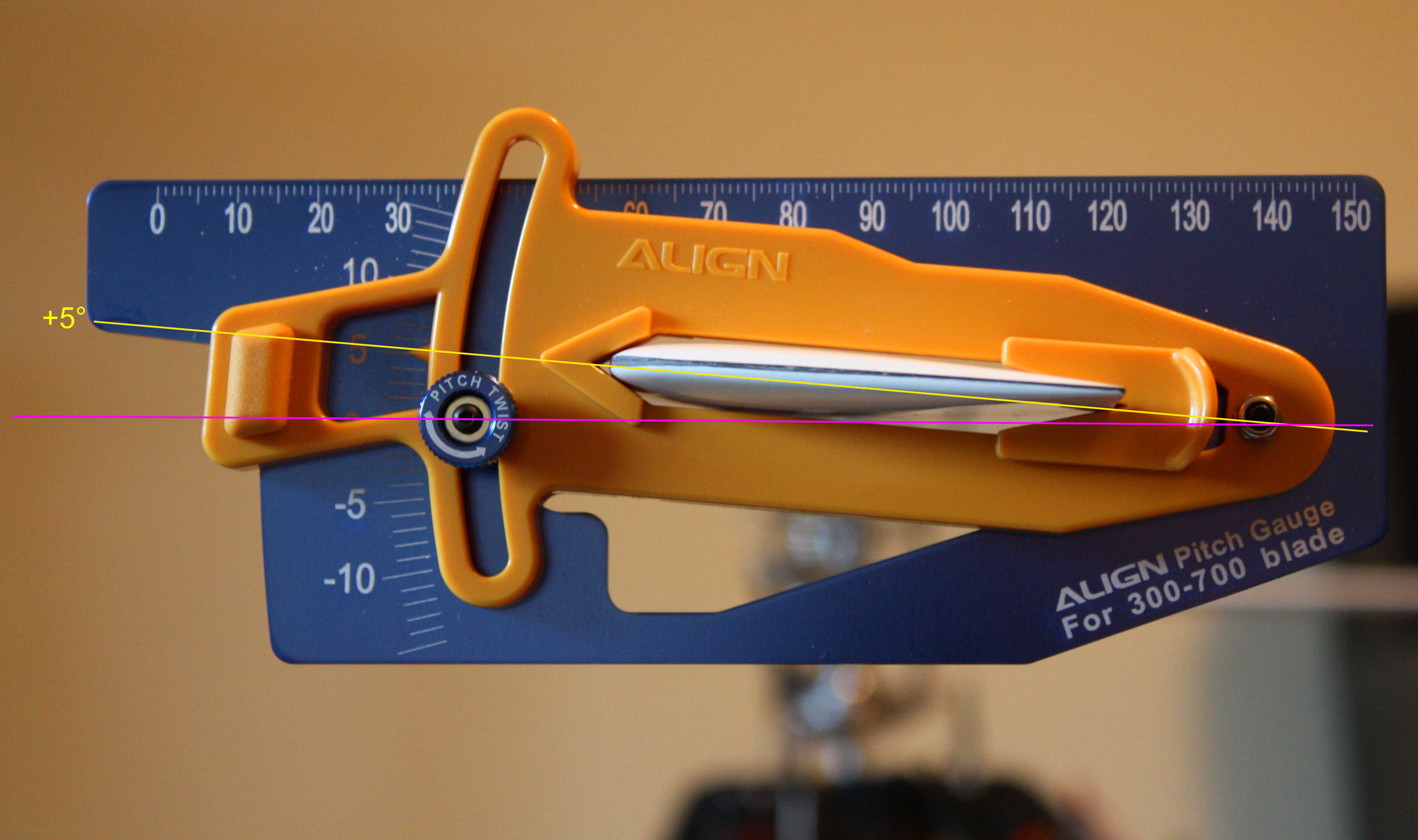 Anstellwinkelmessmethode mit einer Pitchlehre - pitch gauche in progress